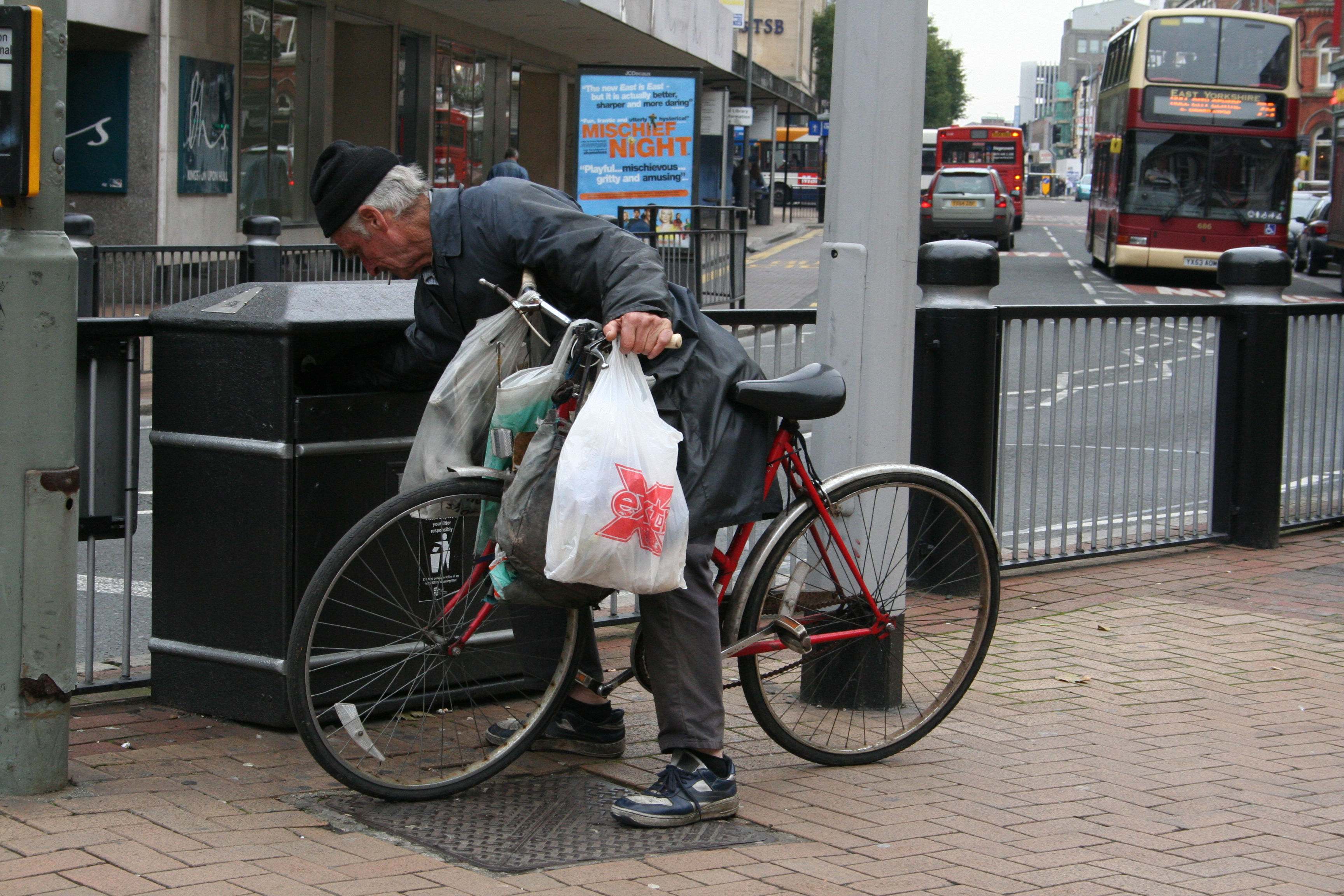 Een dakloze op zoek naar voedsel, in de Jameson Street in Hull (EN). De foto is door de uploader (Maurits Vink) gemaakt. Daar de gefotografeerde persoon niet in herkenbaar in beeld staat en ik de foto onder ht publieke domein heb gezet, mag de foto overal voor worden gebruikt. Ik zou wel graag een berichtje willen krijgen als de foto ergens anders dan voor Wikipedia wordt gebruikt, zuiver voor mijn interesse.